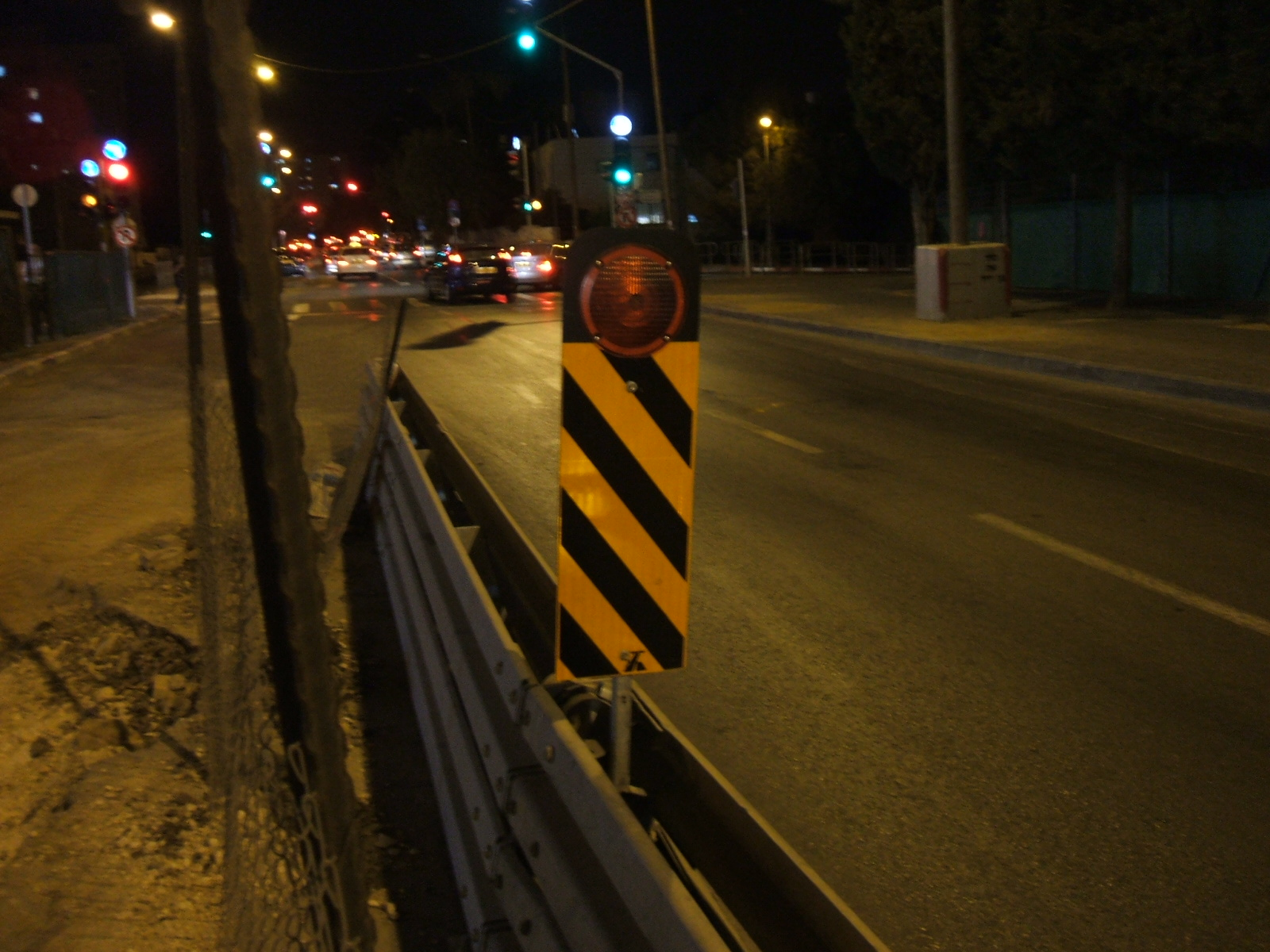 Blinker on road works in Jerusalem